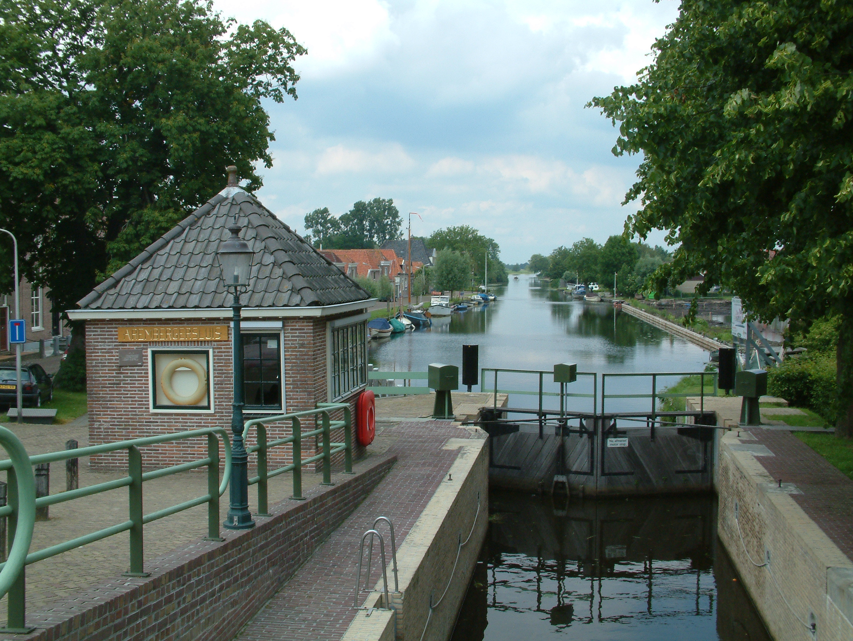 DeArembergersluis in Zwartsluis.